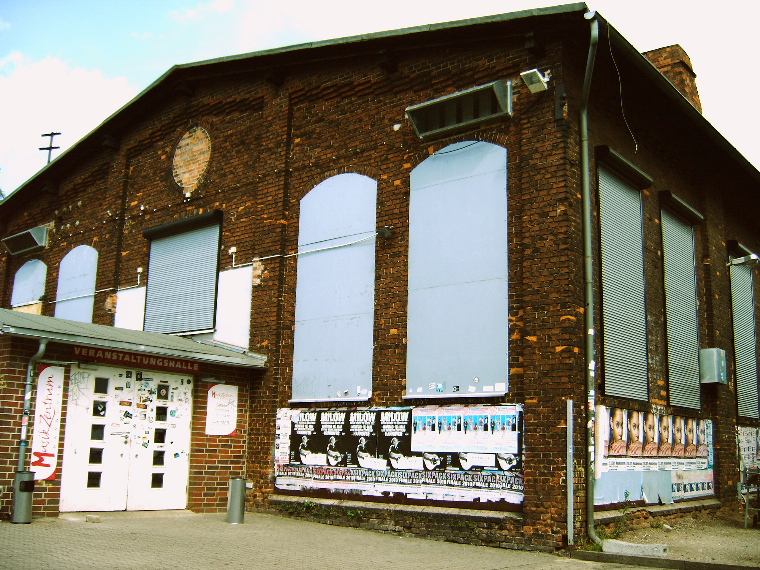 Die Veranstaltungshalle vom MusikZentrum Hannover mit dem neu vorgebauten Eingangsbereich. Das Gebäude diente zuvor der Maschinenbau-Firma Knoevenagel als Garage für ihre Produkte.